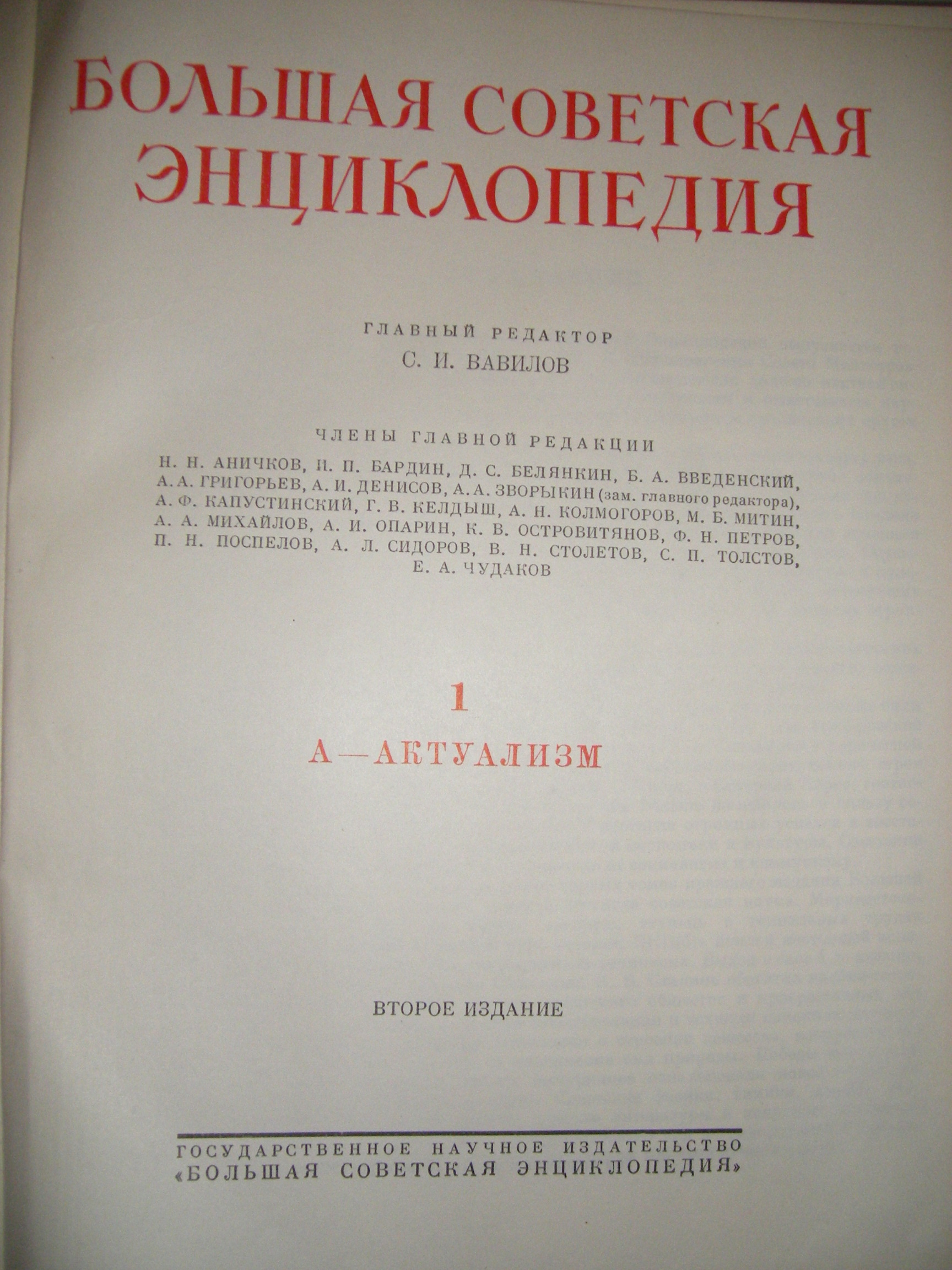 A Nagy Szovjet Enciklopédia 2. kiadásának 1. kötete